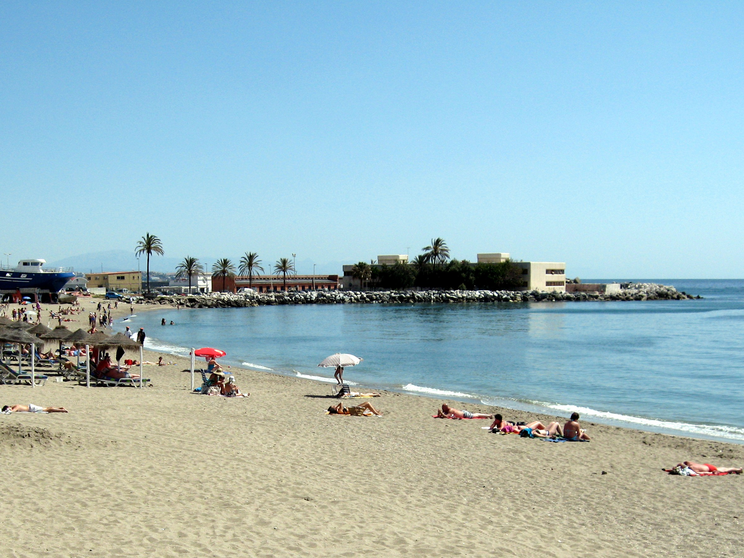 Strand von Fuengirola / Playa de Fuengirola, Fuengirola, Provinz Málaga, Andalusien, Spanien